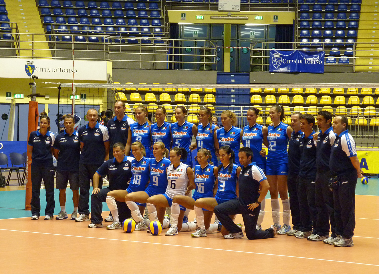 La nazionale italiana alla Piemonte Woman Cup 2010.